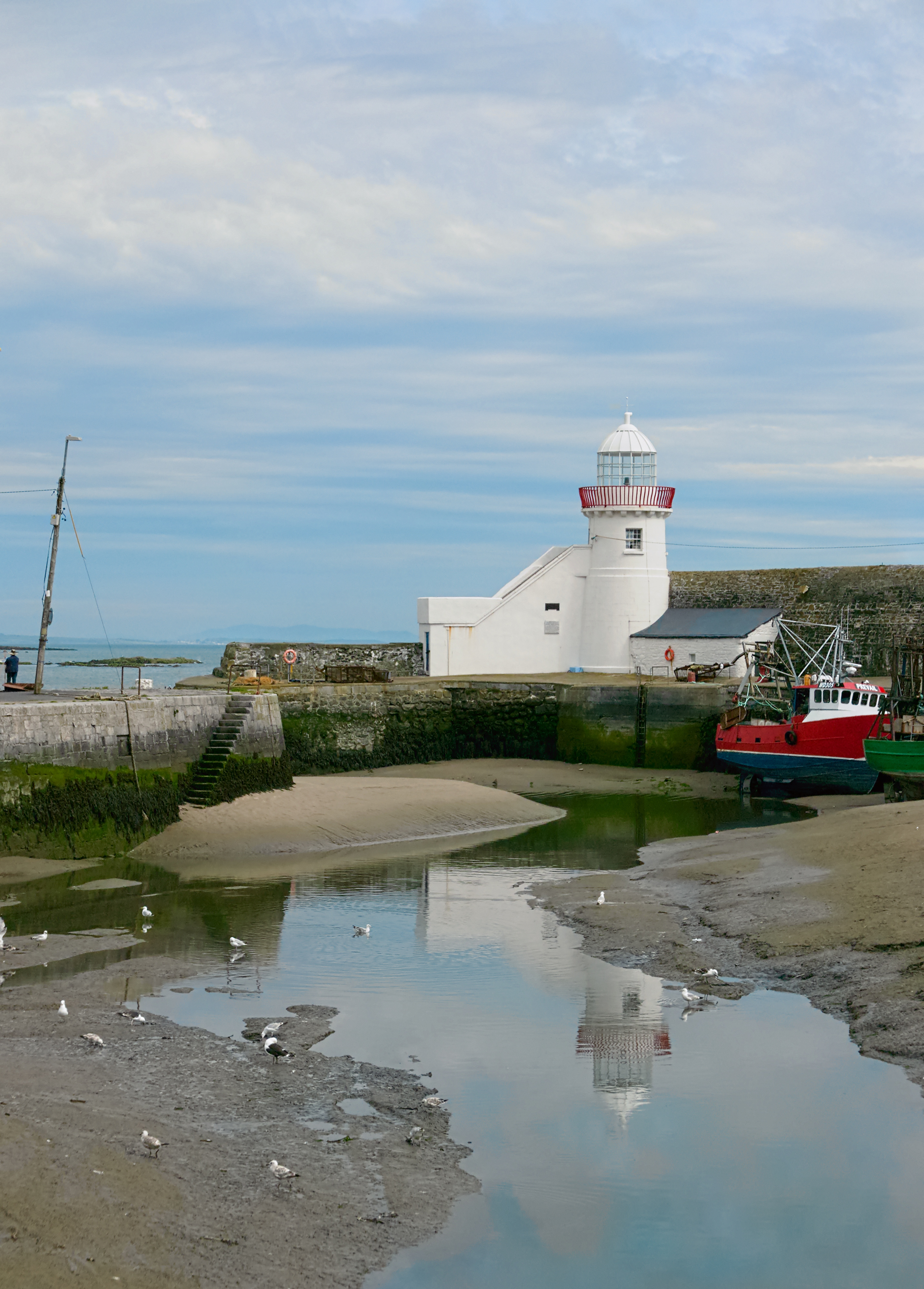 Маяк в городе Балбригган